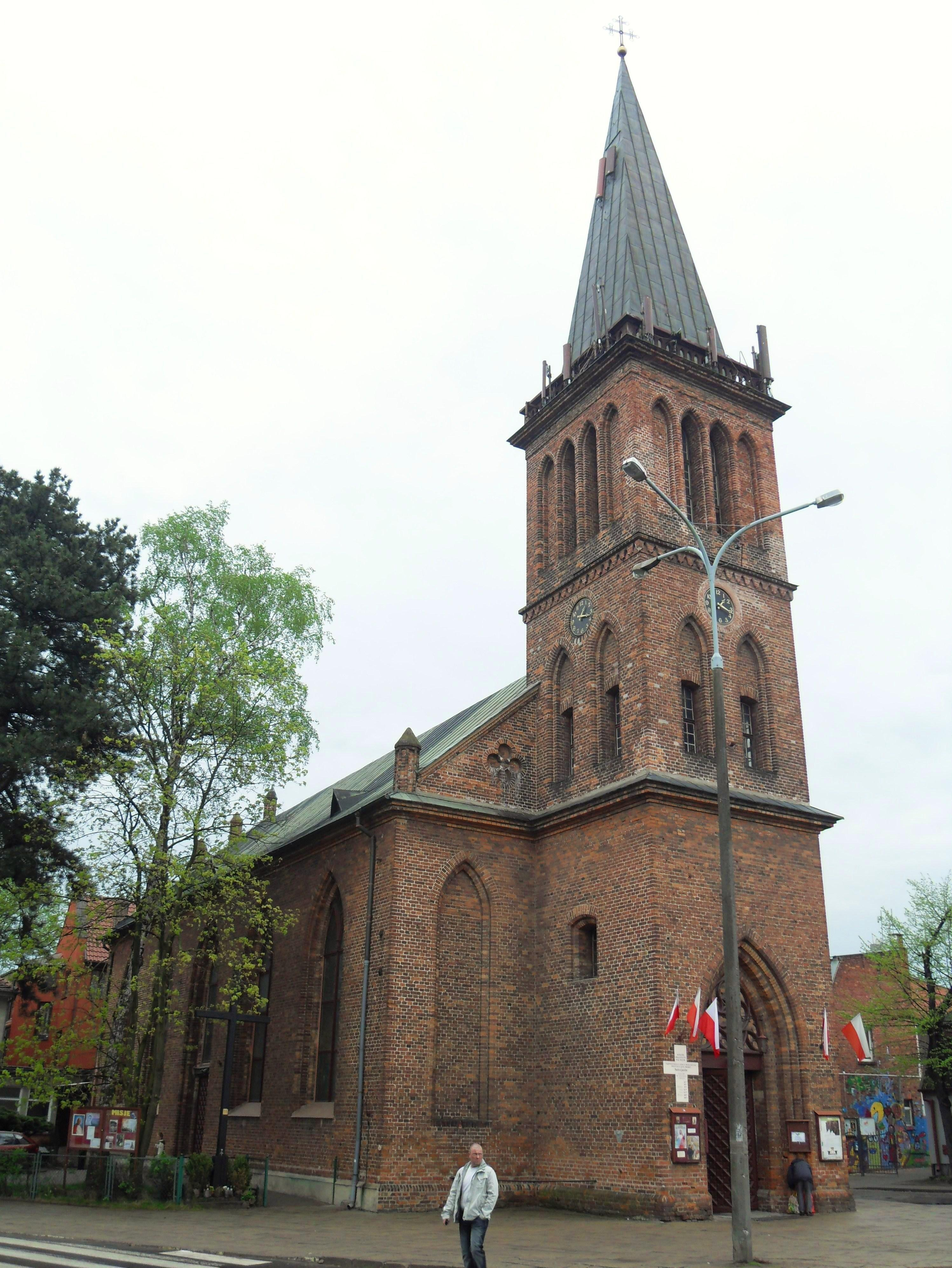 Gdańsk Orunia, ul. Gościnna 15 - dawny kościół ewangelicki św. Jerzego, obecnie rzymskokatolicki parafialny p.w. św. Jana Bosko, 1820-1823